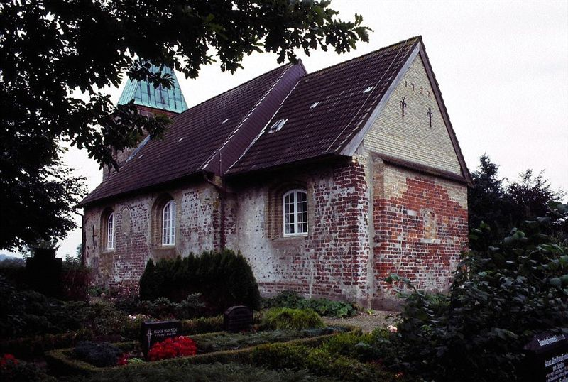 Rüllschau Kirke (Rylskov) i Danmark. Rüllschau kirke